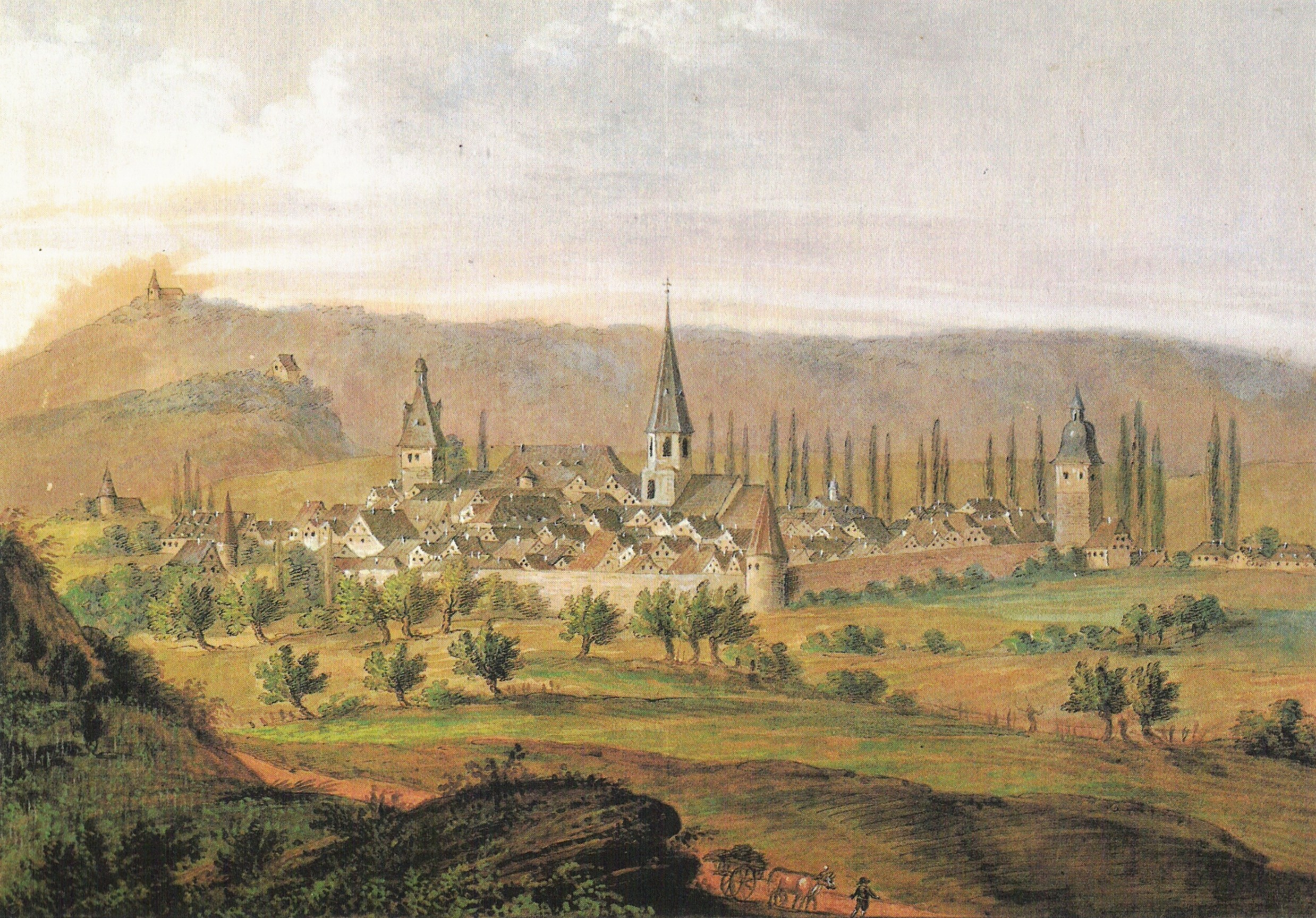 „Brackenheim von Nordosten mit Blick über die Johanniskirche und Schloß Magenheim zum Michaelsberg“